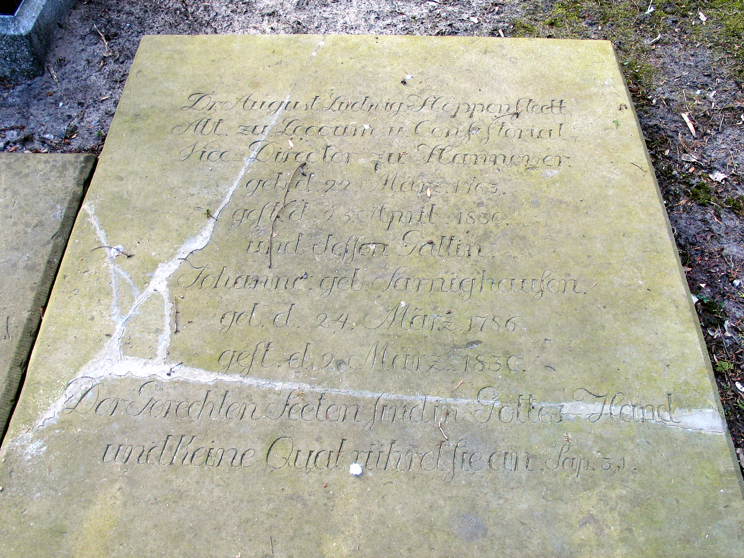 Foto vom Helentorfriedhof, östlicher Teil ...